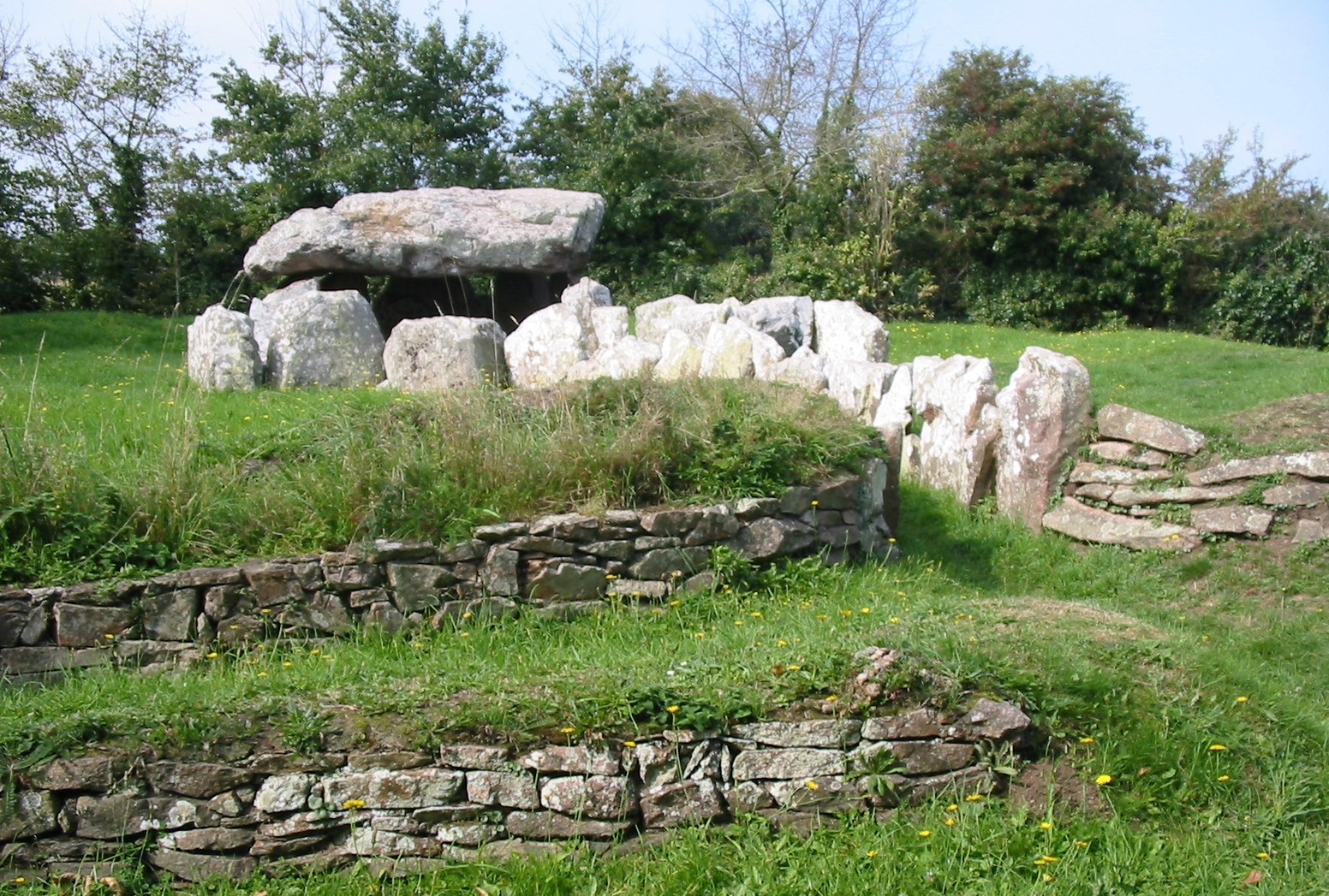 Nrf: Jèrri